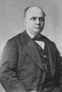 Albert Descamps (1832-1910), député du Gers, maire de Lectoure.